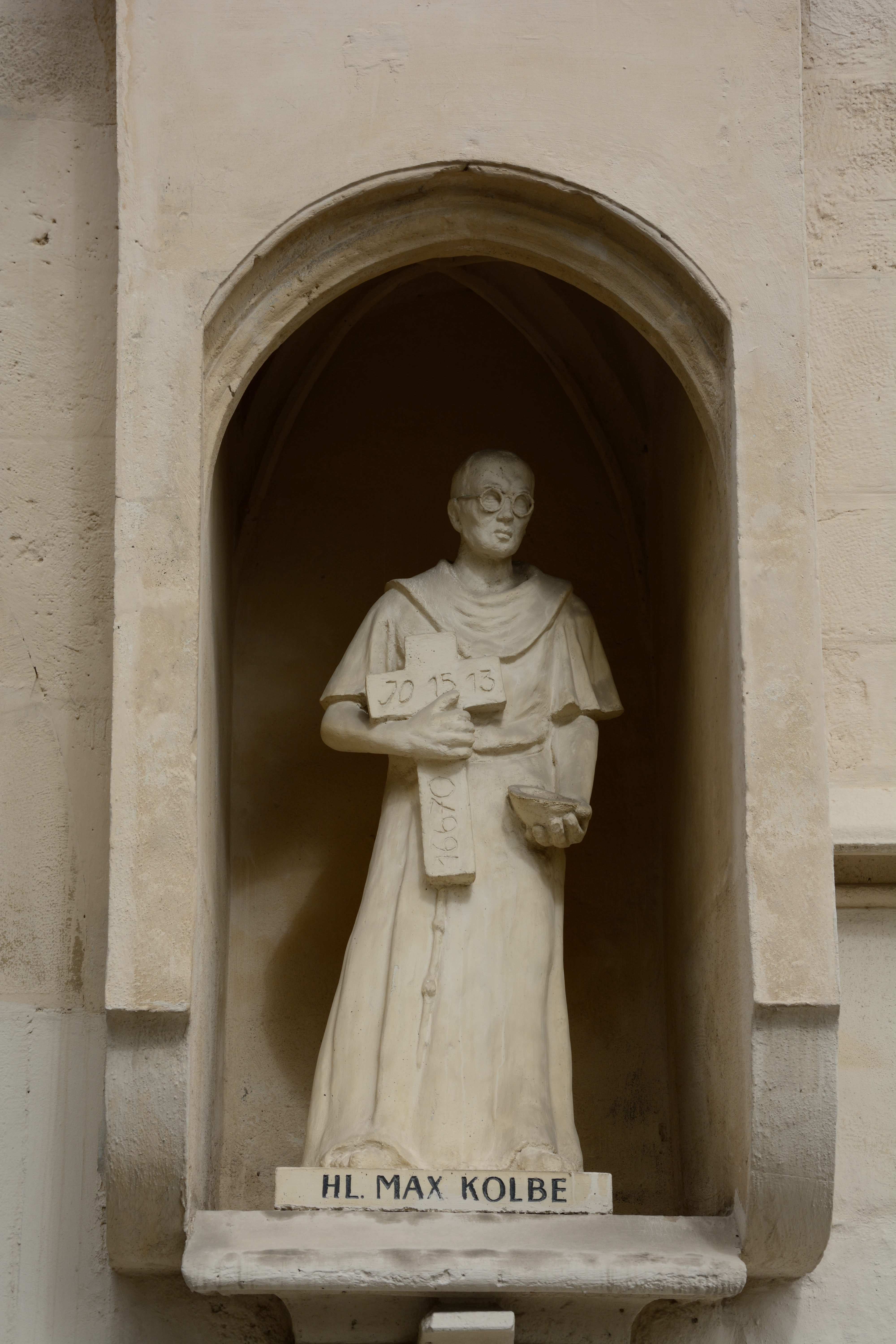 Kath. Pfarrkirche hl. Ägydius